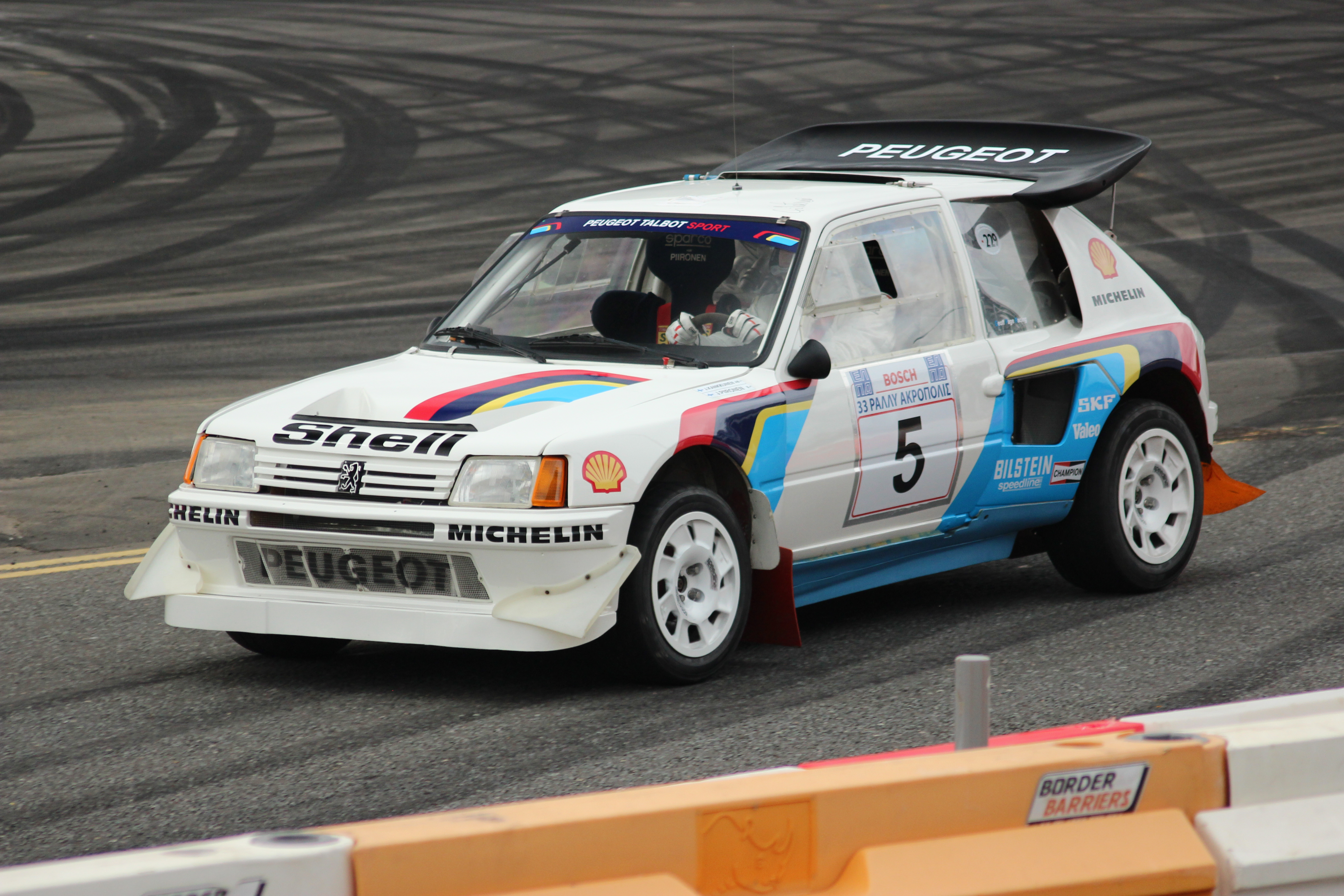 Ignition Festival Glasgow